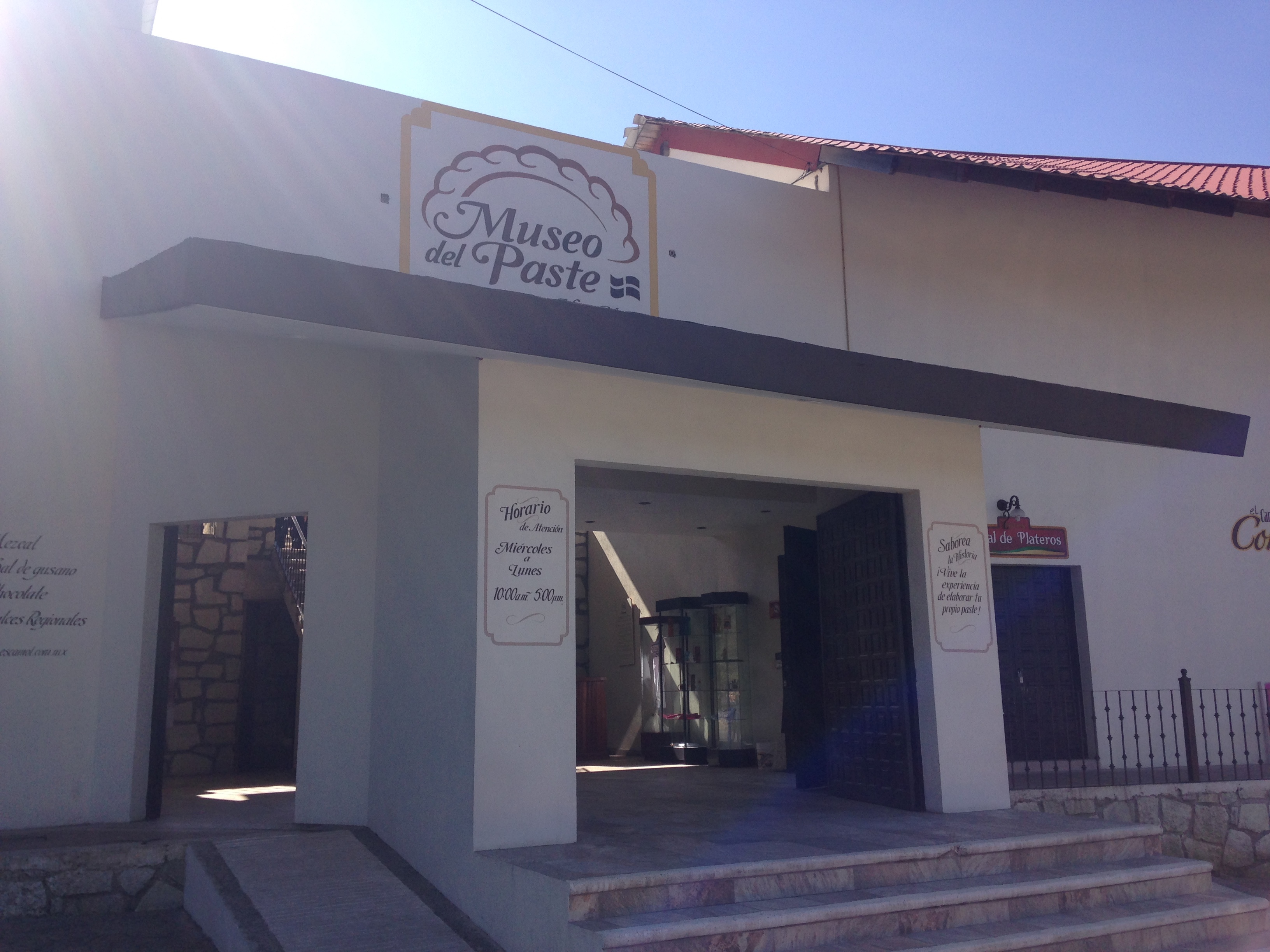 Inaugurado el 12 de octubre de 2012. En él se puede apreciar, en forma interactiva, la elaboración de este tradicional platillo, también se observarán herramientas mineras, utensilios de cocina, entre otros instrumentos vinculados al quehacer cotidiano.